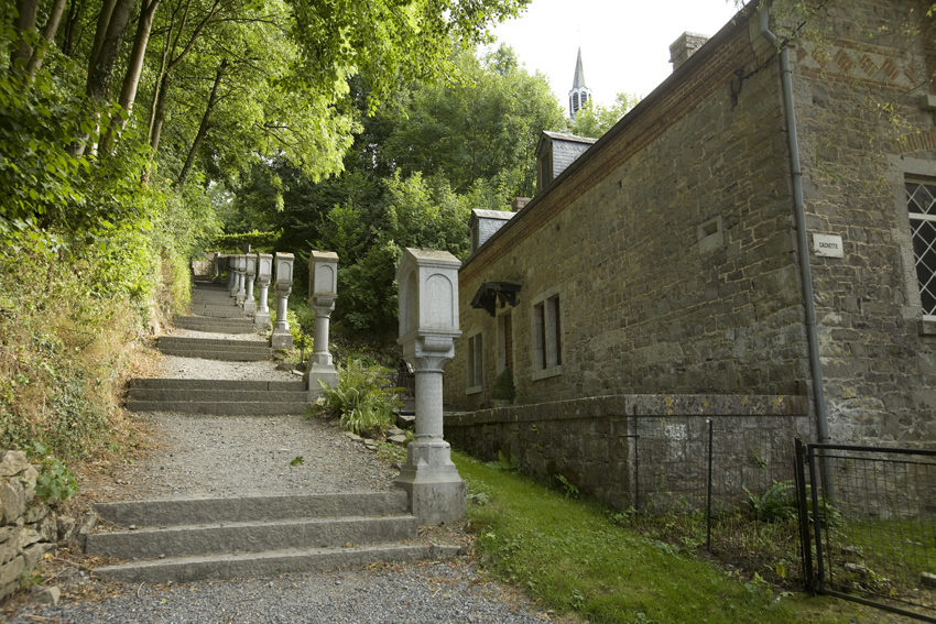 le chemin de croix en pierre, Celles, Houyet, Belgique